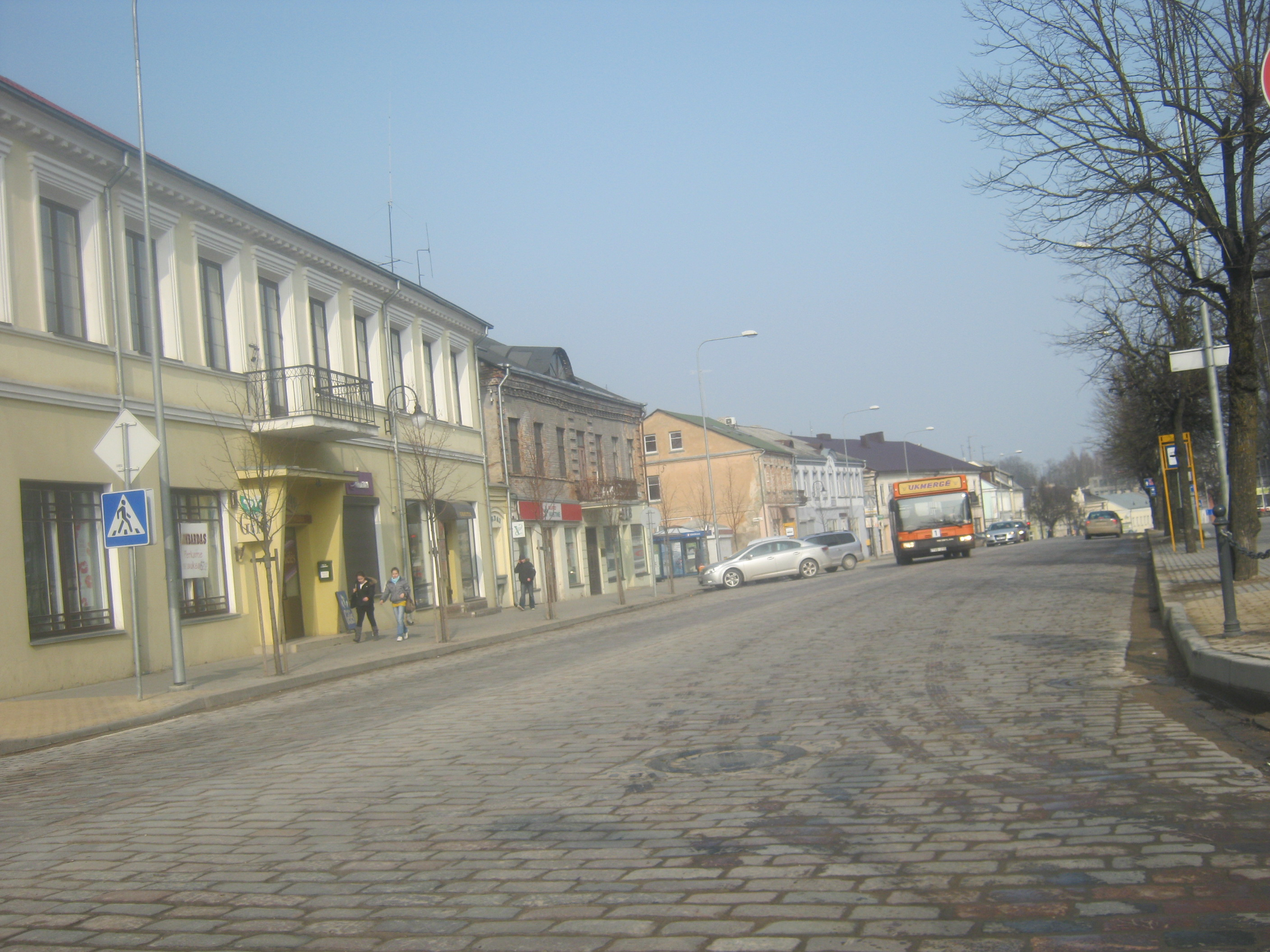 Ukmergė